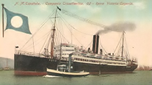 Postal de la Cª Transatlántica del Vapor Reina Victoria Eugenia, España, hacia 1914